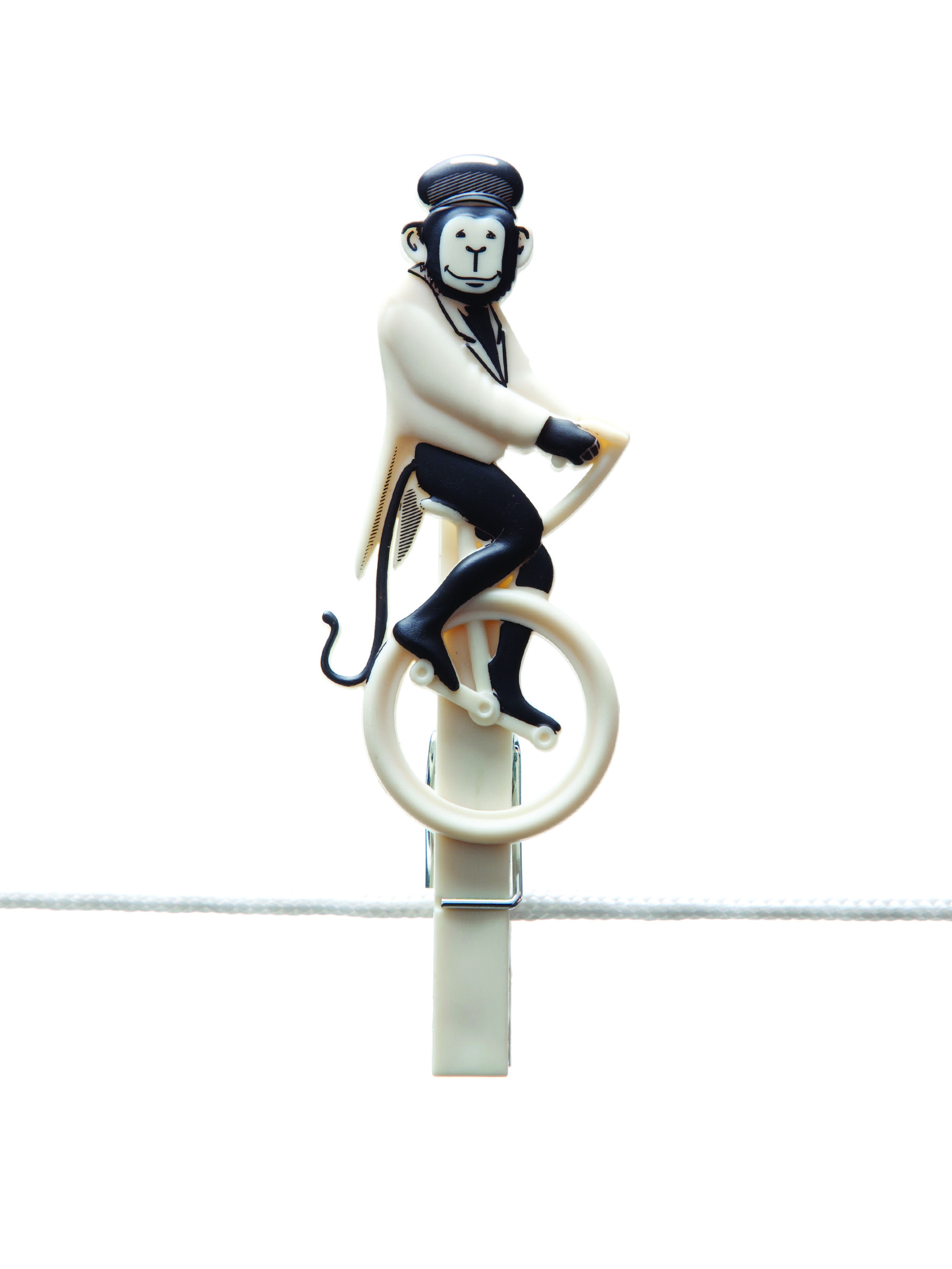 משפחת פגזיני- אטבי כביסה מהלכי חבל, הזרקת פלסטיק, עיצוב דמויות: ענבל הופמן, 2011